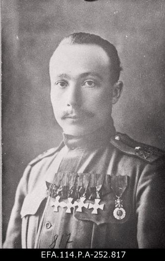 Vene 269.Novorževi polgu luurekomando ülem lipnik Anton Irv.